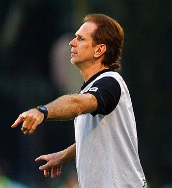 Sérgio Guedes como treinador da Ponte Preta em 2010.